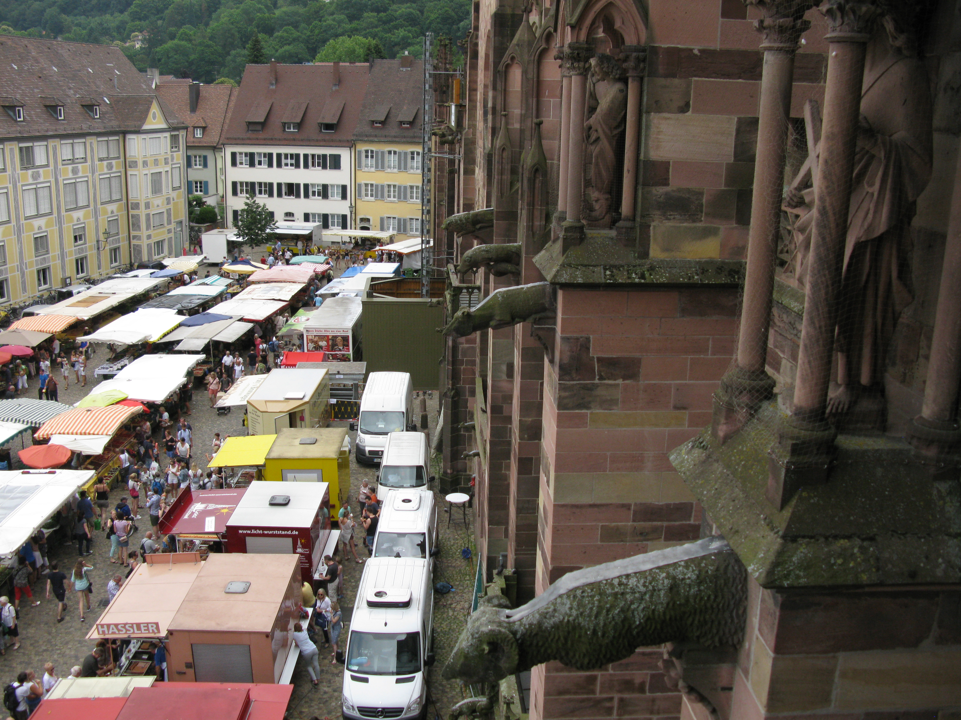 Münstermarkt und Wasserspeier bei einer Baustellenbesichtigung am nördlichen Münsterturm in Freiburg